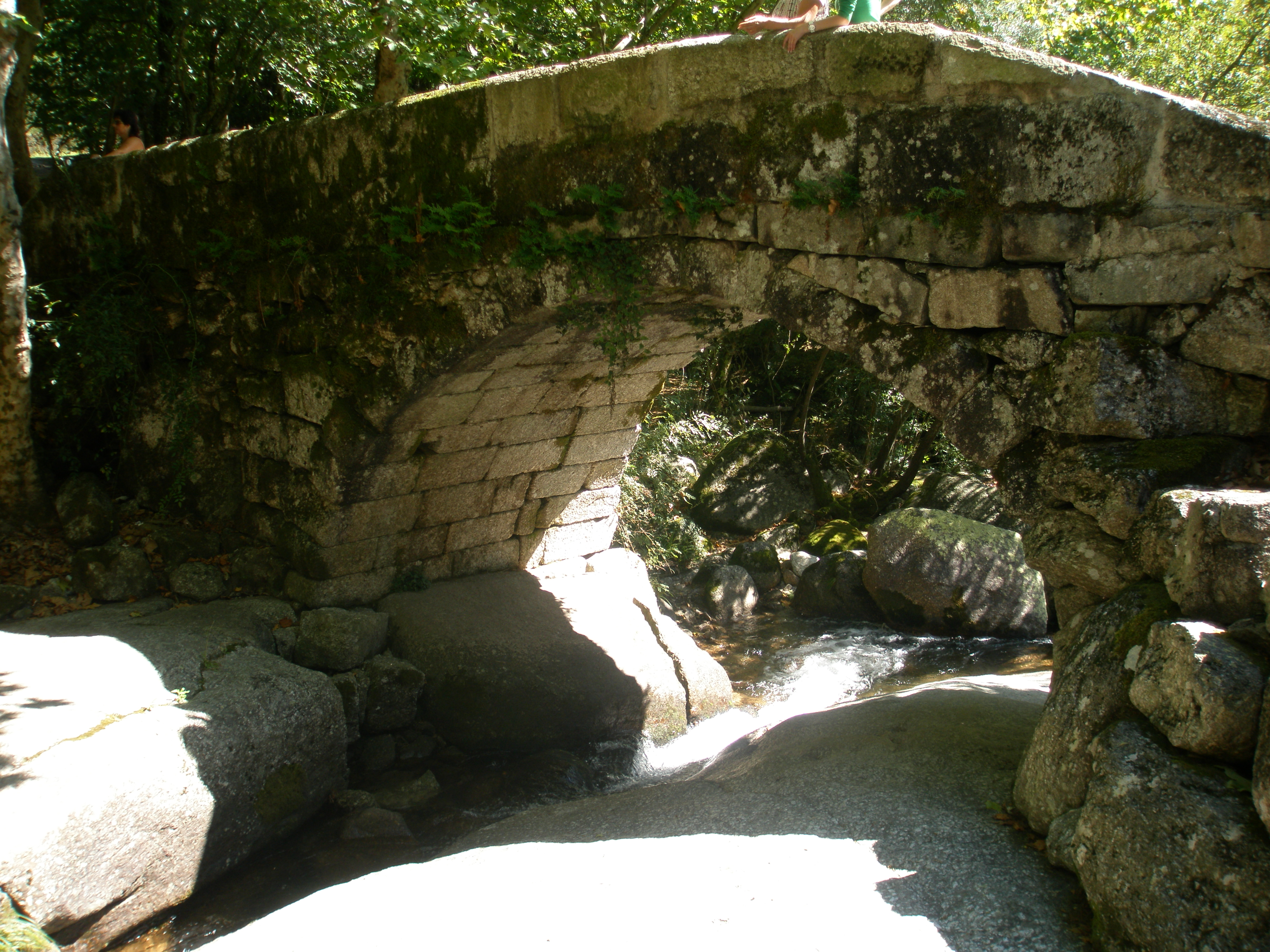 Ponte sobre o Rio